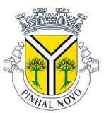 Brasao Pinhal Novo (Coat of arms of Pinhal Novo (Portugal)